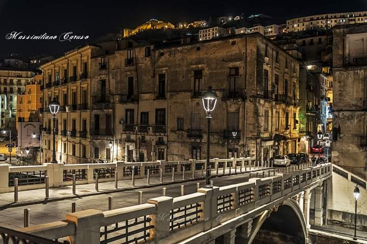 Scorcio notturno del Ponte dei Pignatari nel centro storico di Cosenza